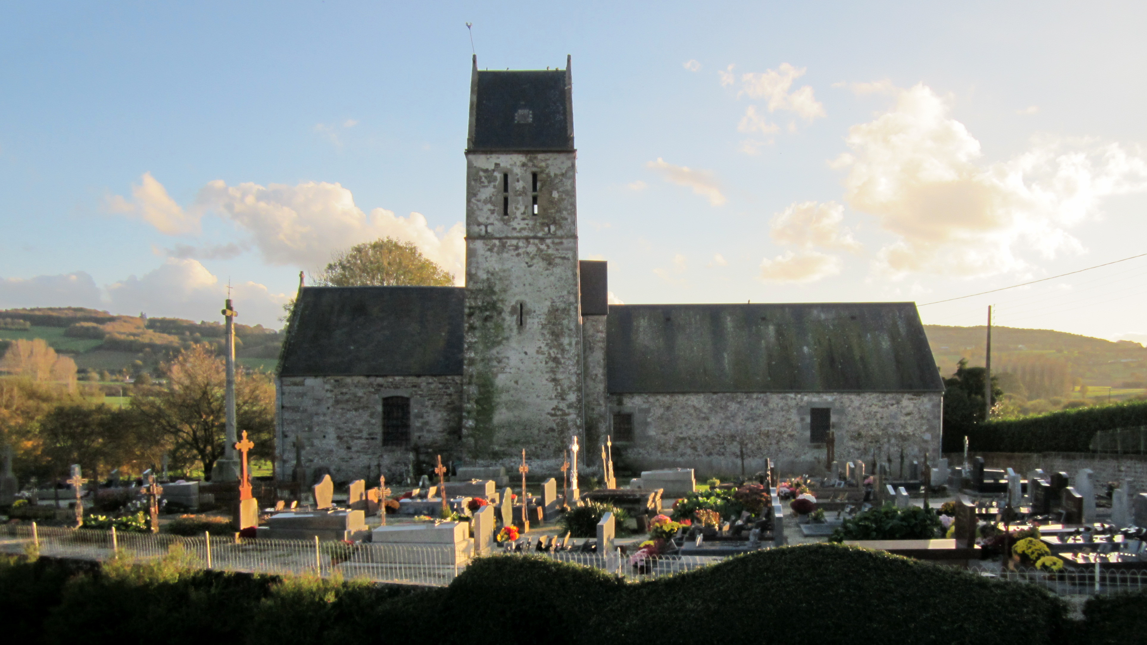 Vernix, Manche